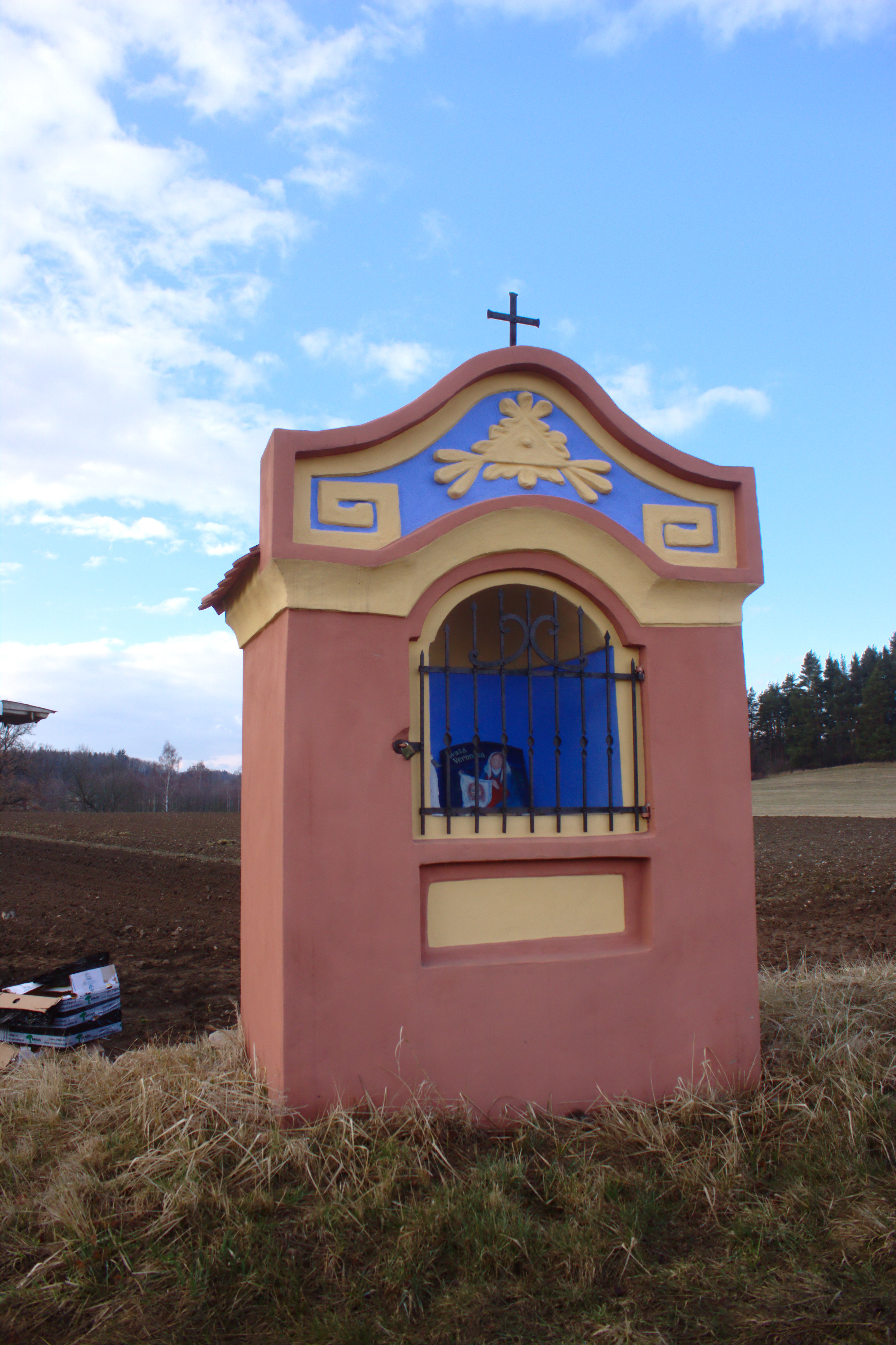 Kaplička ve vesnici Hrbov Project: Fotíme Česko